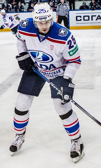 Нападающий тольяттинской «Лады» Фёдор Фёдоров во время матча чемпионата КХЛ против хабаровского «Амура» 10 декабря 2014 года.